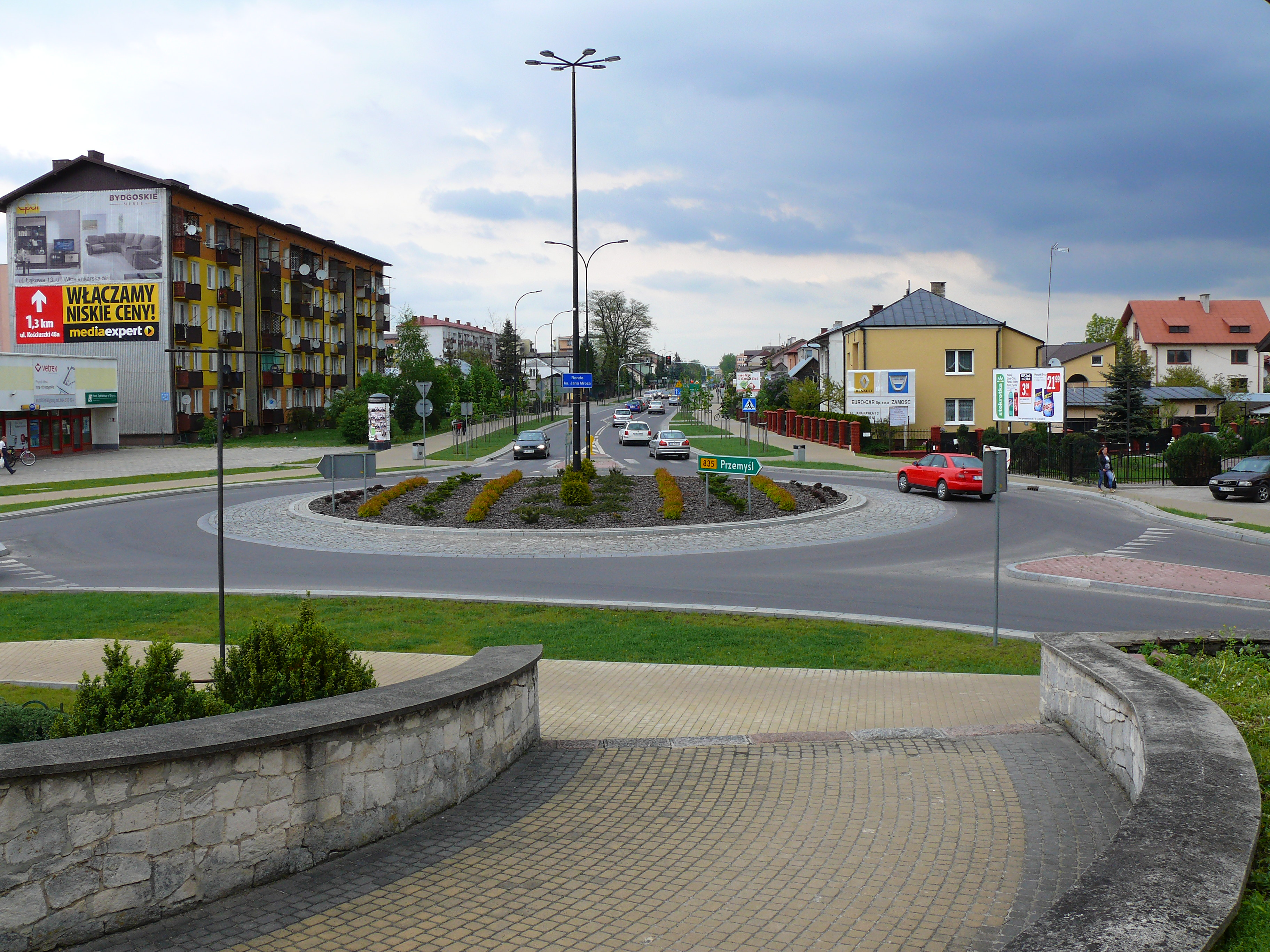 Rondo ks. Jana Mroza w Biłgoraju